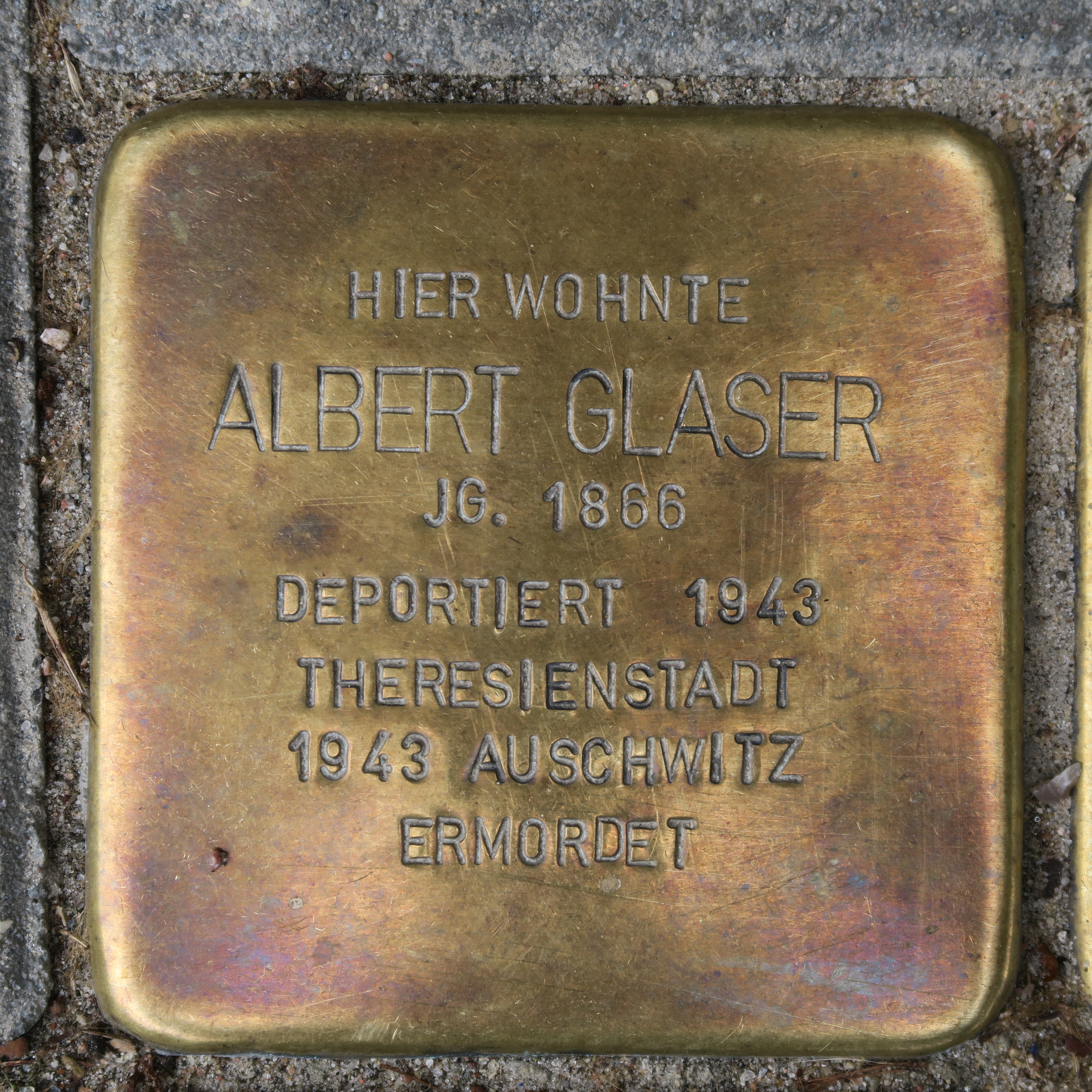 Stolperstein für Albert Glaser am Grindelberg 77